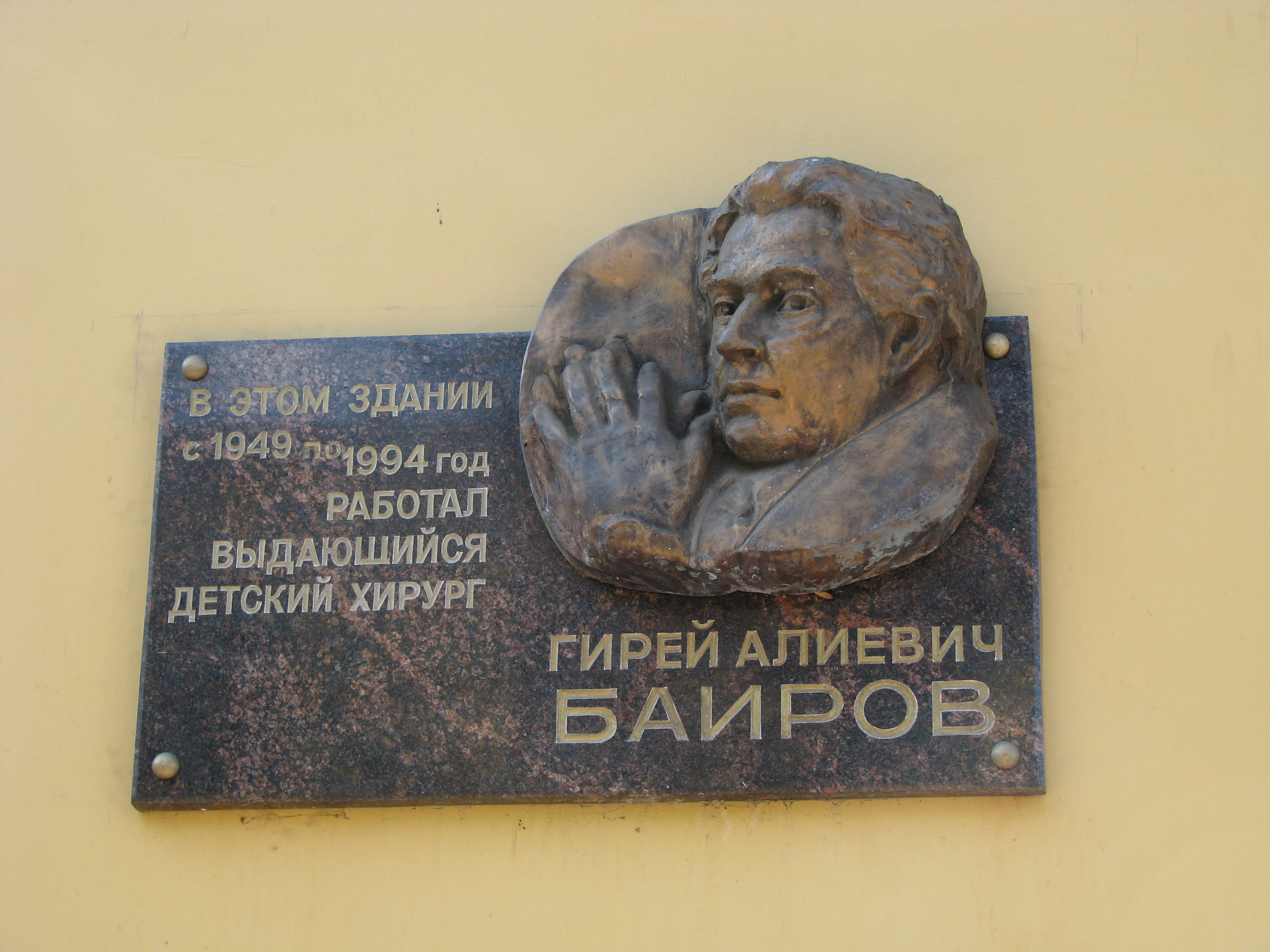 Памятная доска Баирову Г.А.